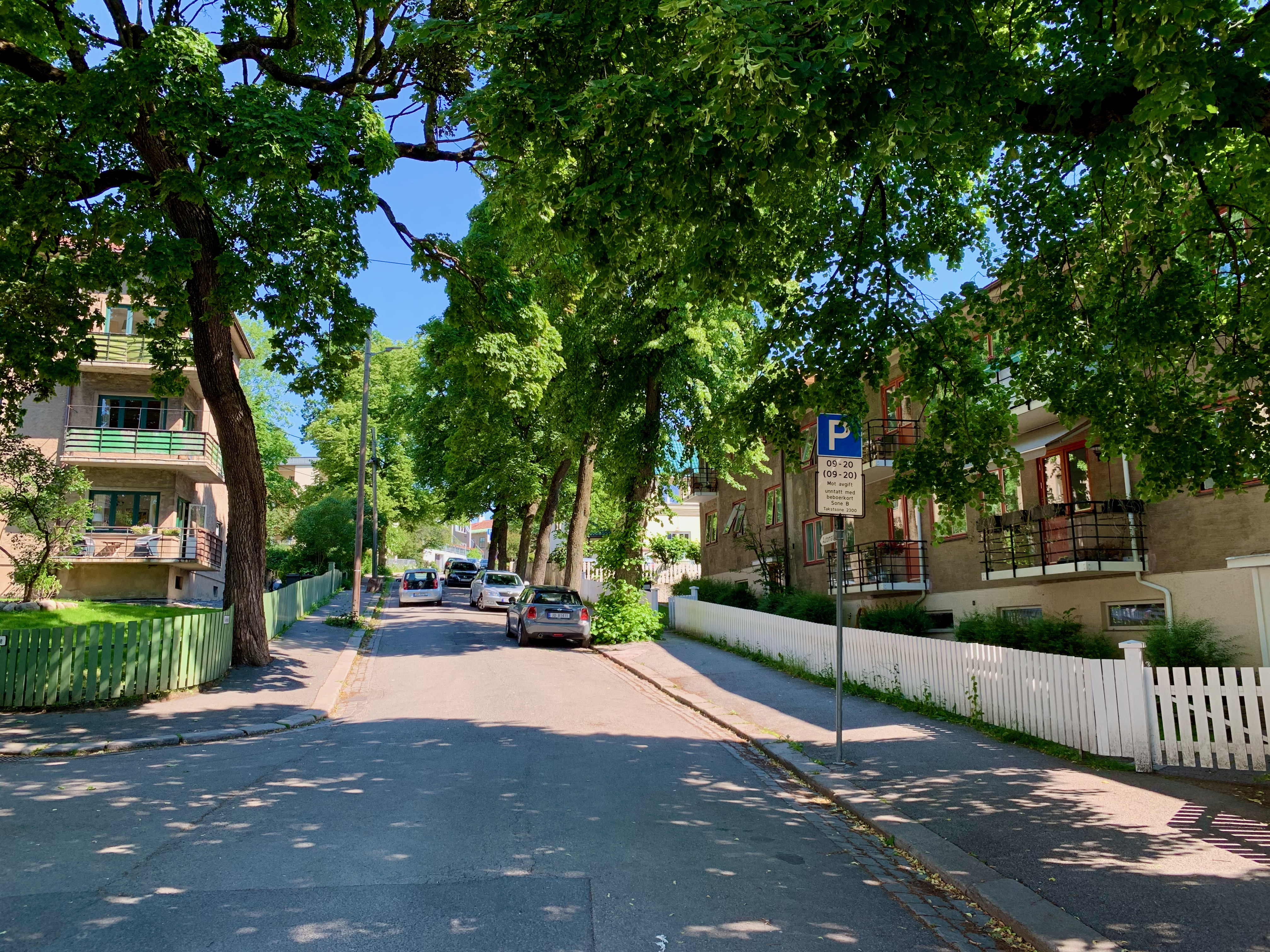 Vallegata i Oslo.